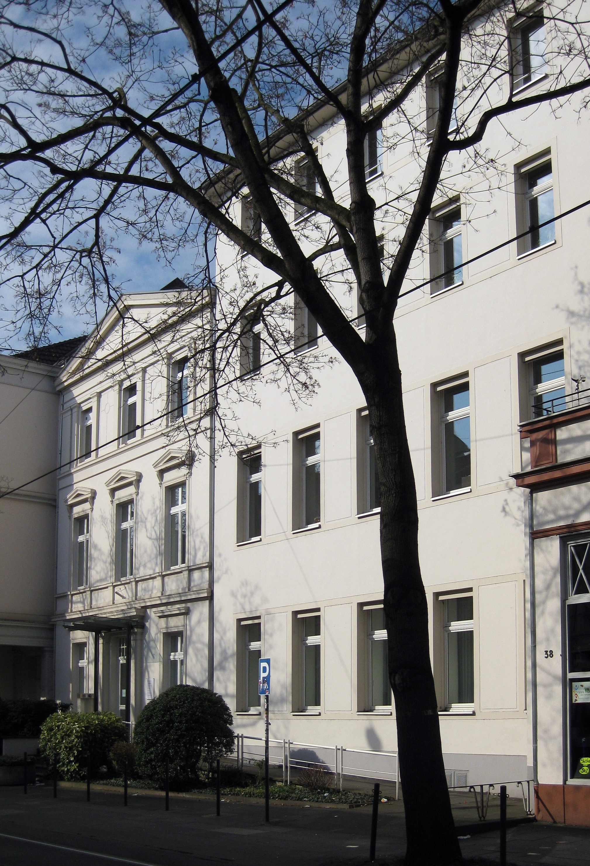 Haus der Krebs-Selbsthilfe, Deutschland, Bonn, Thomas-Mann-Str. 40. Das Haus ist Sitz mehrerer bundesweit tätiger Krebs-Selbsthilfeorganisationen